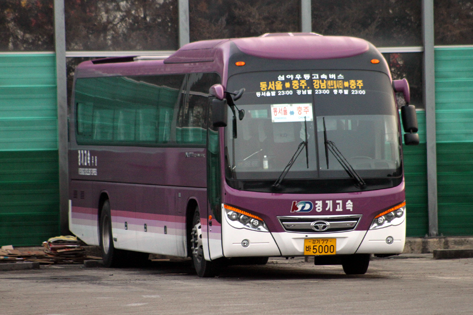 경기고속 소속 대우 FX II 120 Cruising Star